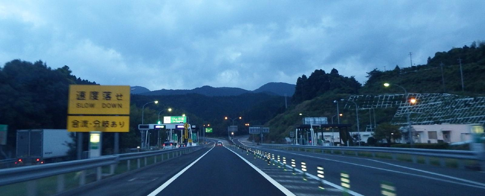 いよ小松インターチェンジ上り